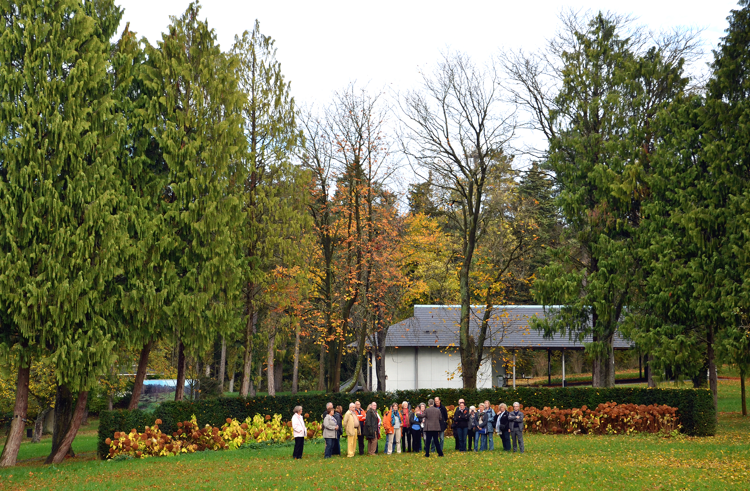 Eckhardt Liss bei einem Vortrag vor einer vom Freundeskreis Hannover organisierten Besuchergruppe rund um die Skulptur SELBSTPORTRÄT des Schweizers Urs Lüthi.